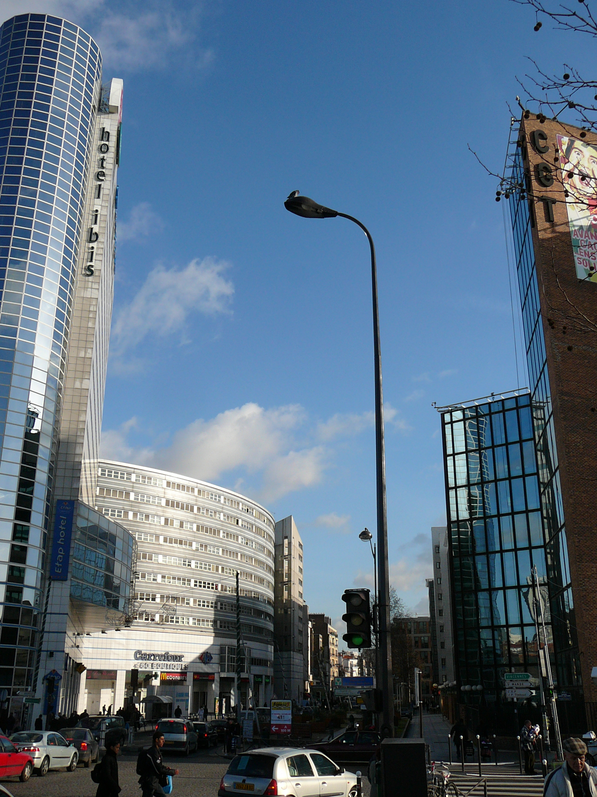 Porte de Montreuil, côté Montreuil, France